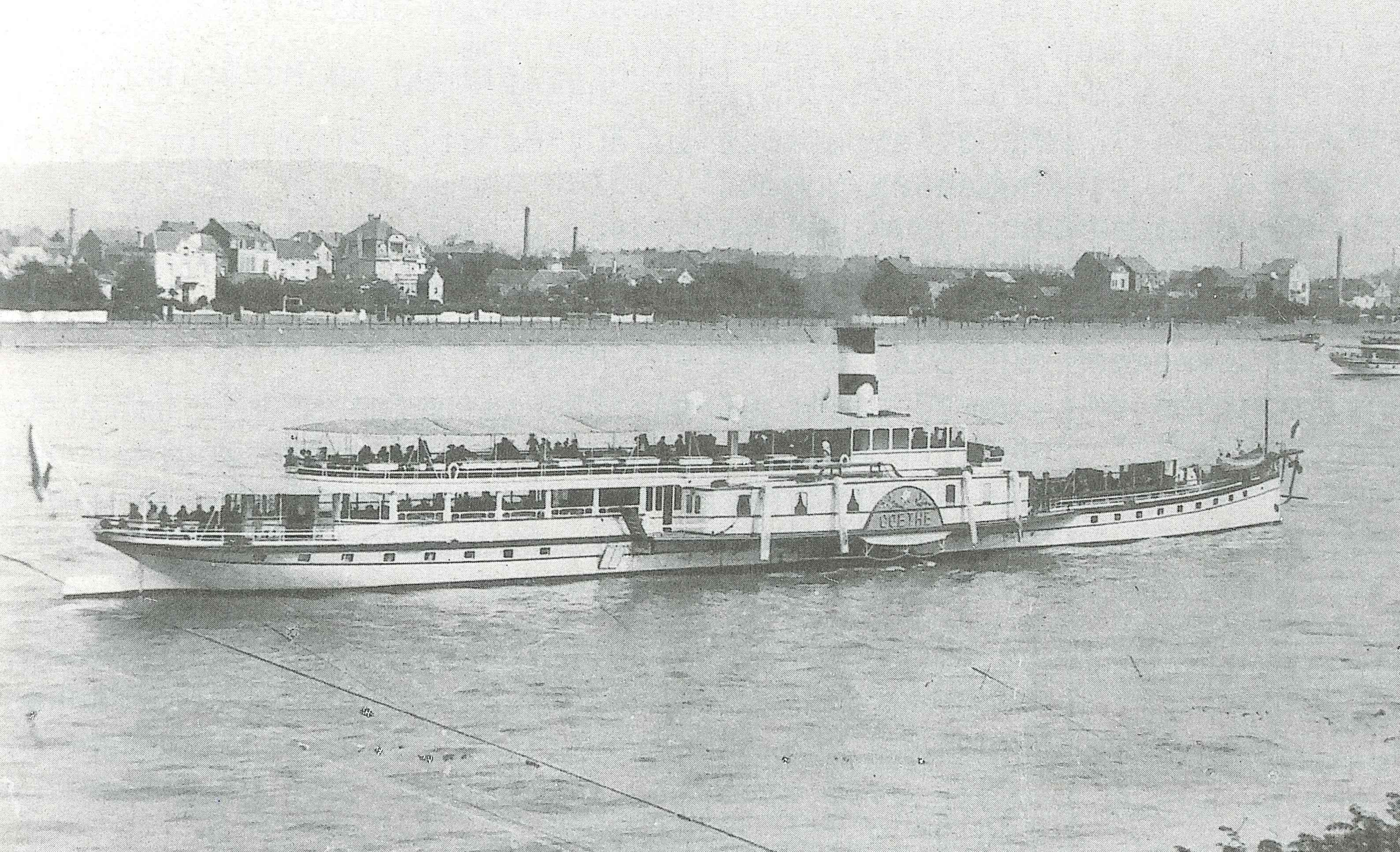 Der Glattdeckdampfer Goethe in der Sommerversion